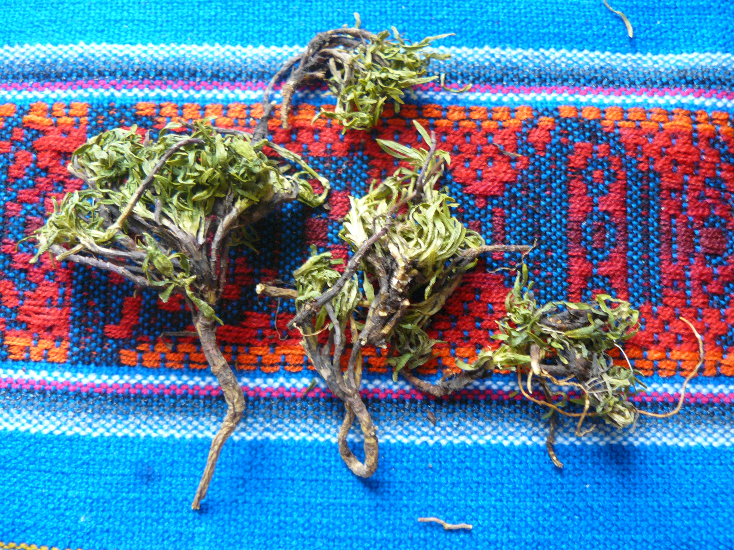 Gentianella alborosea (hercampuri)